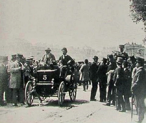 Émile Levassor et Charles d'Hostingue, futurs arrivés premiers de Paris-Bordeaux-Paris 1895, en Panhard & Levassor-Phenix 2 places